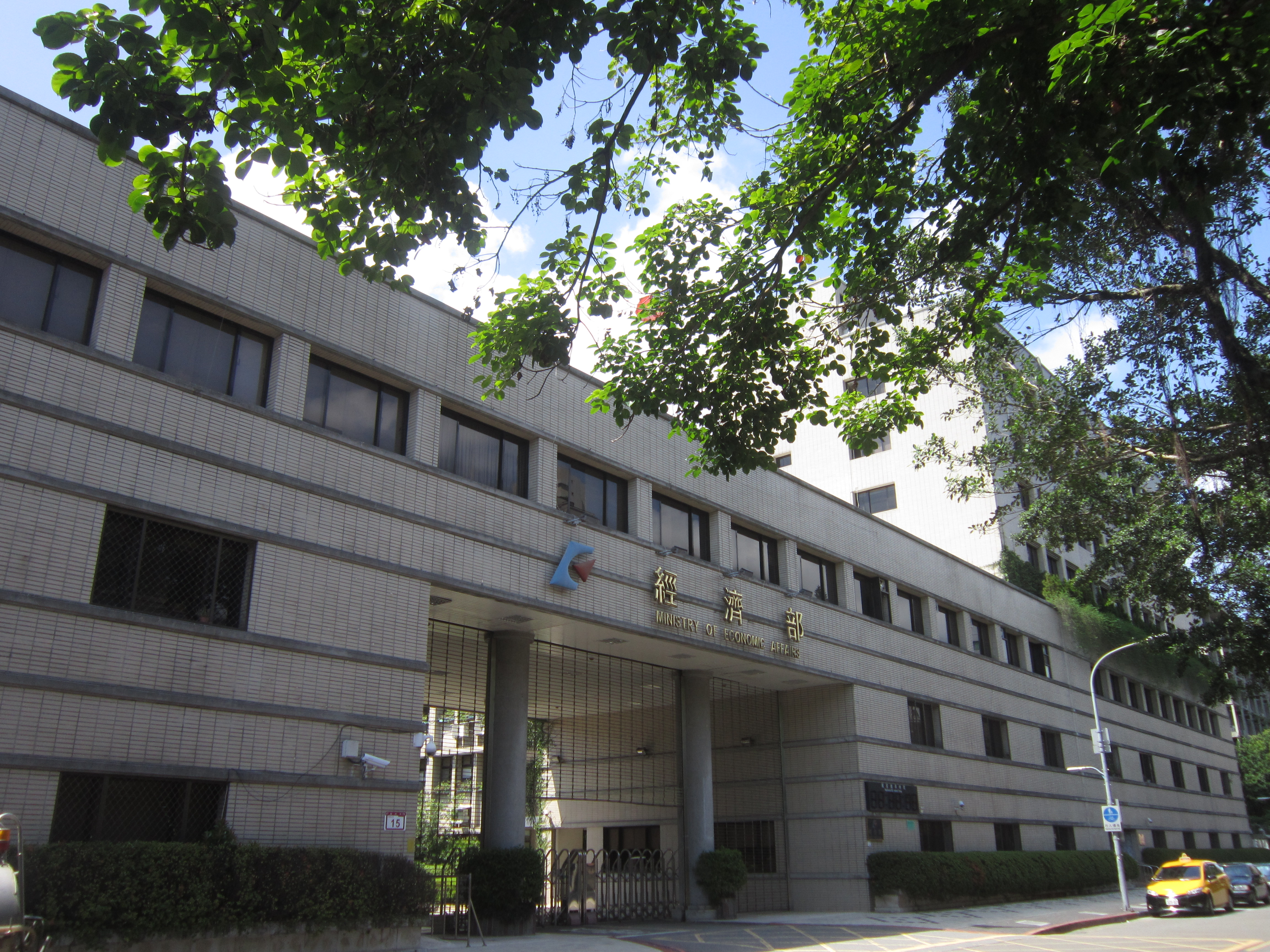 中華民國經濟部本部大樓大門。